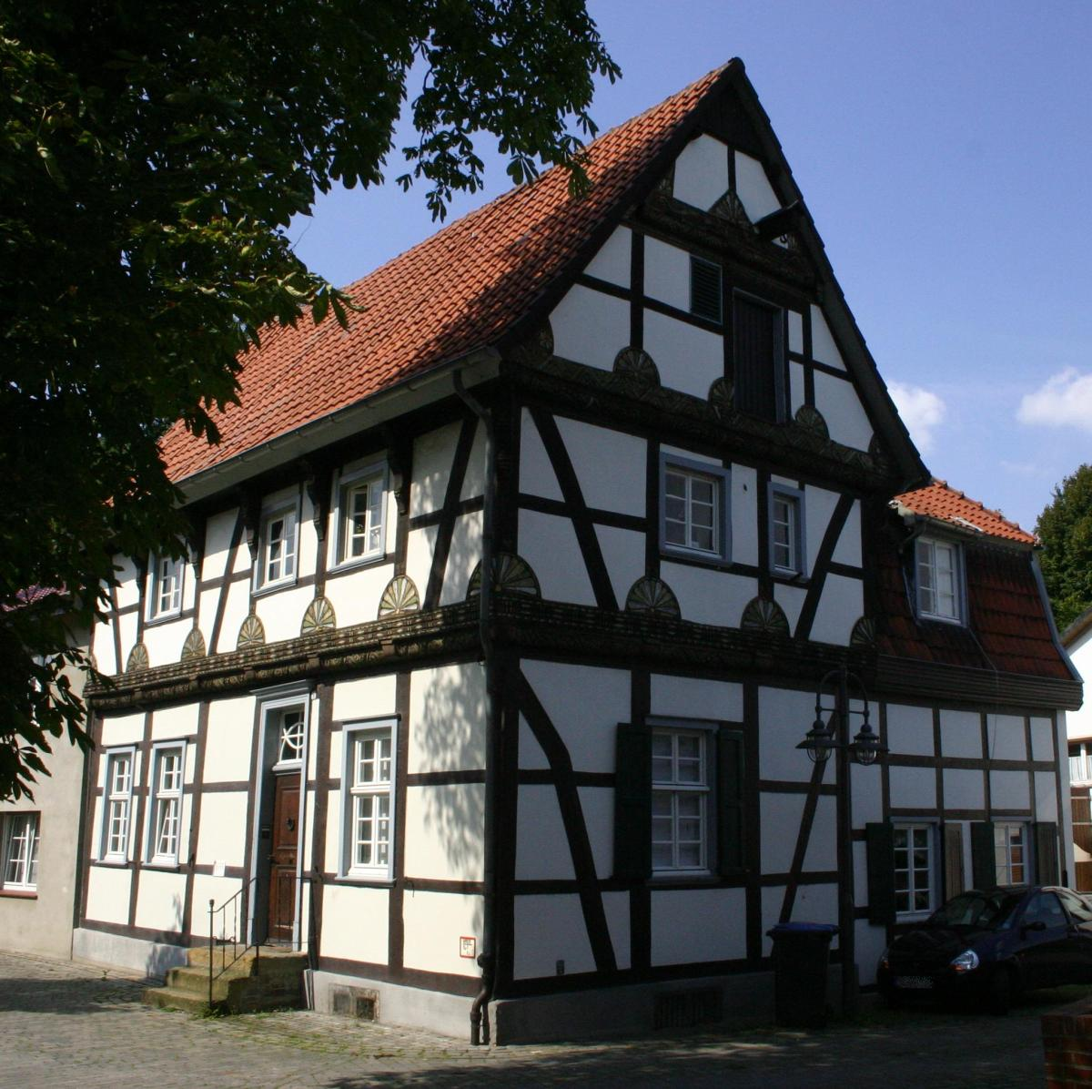 Das Chur Cöllnische Amtshaus Oestinghausen, Lippetal ca. 1596 schriftlich erwähnt. This is a photograph of an architectural monument.